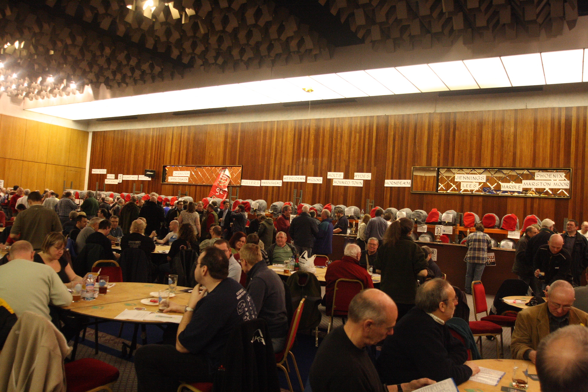 DPP_0001